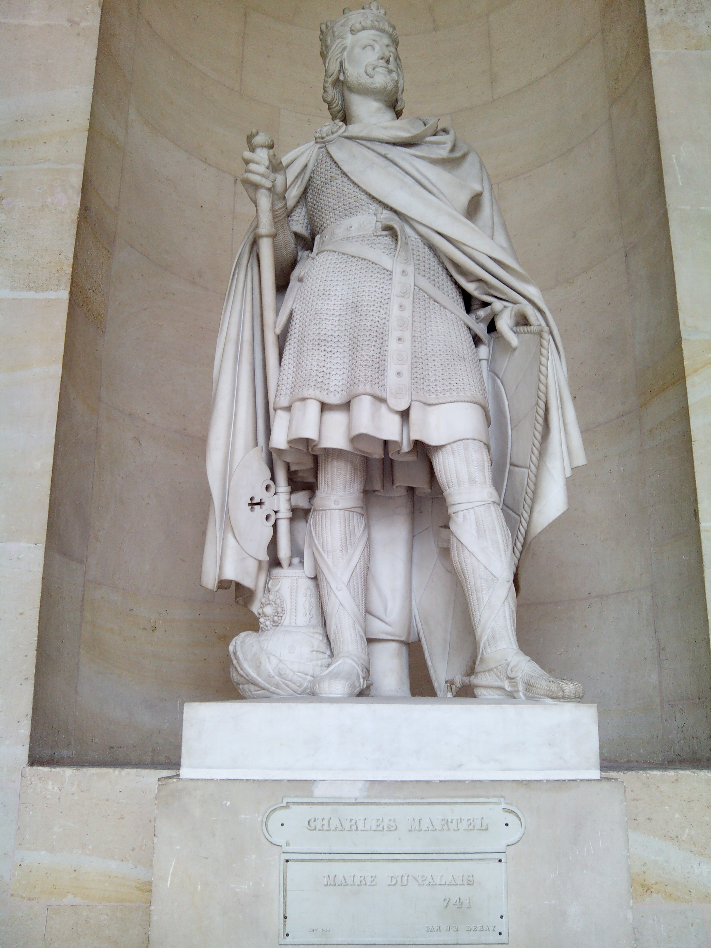 Fotografía realizada en el palacio de Versalles, agosto de 2014